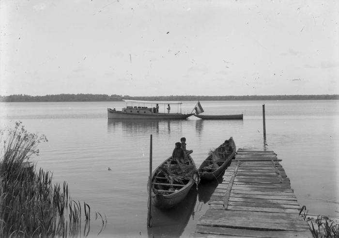 Negatief. Landingsplaats Peperpot